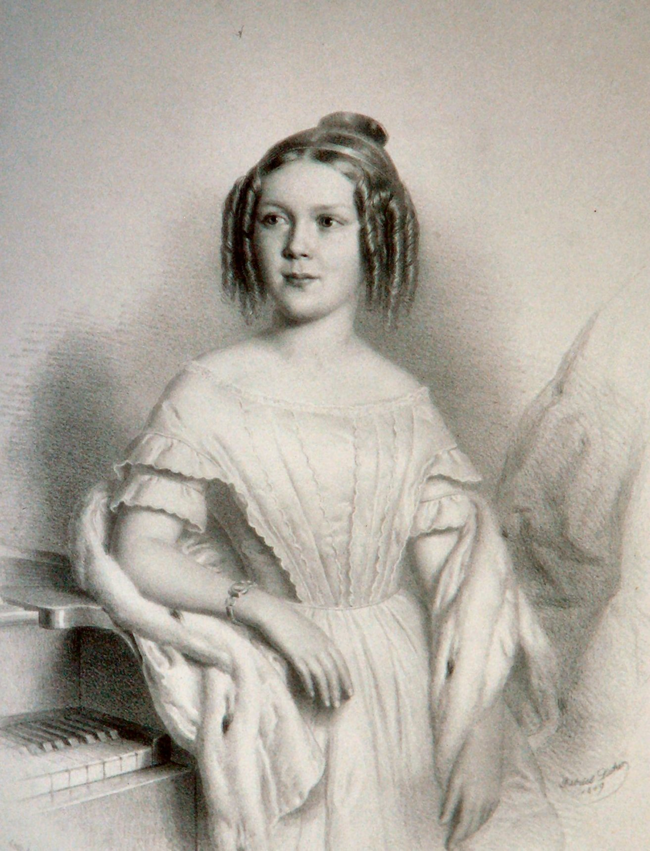 Constanze Geiger als Mädchen, Lithographie von Gabriel Decker, 1849